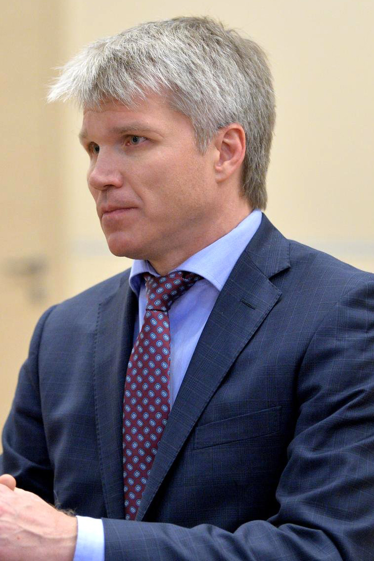 Министра спорта Российской Федерации Павел Колобков